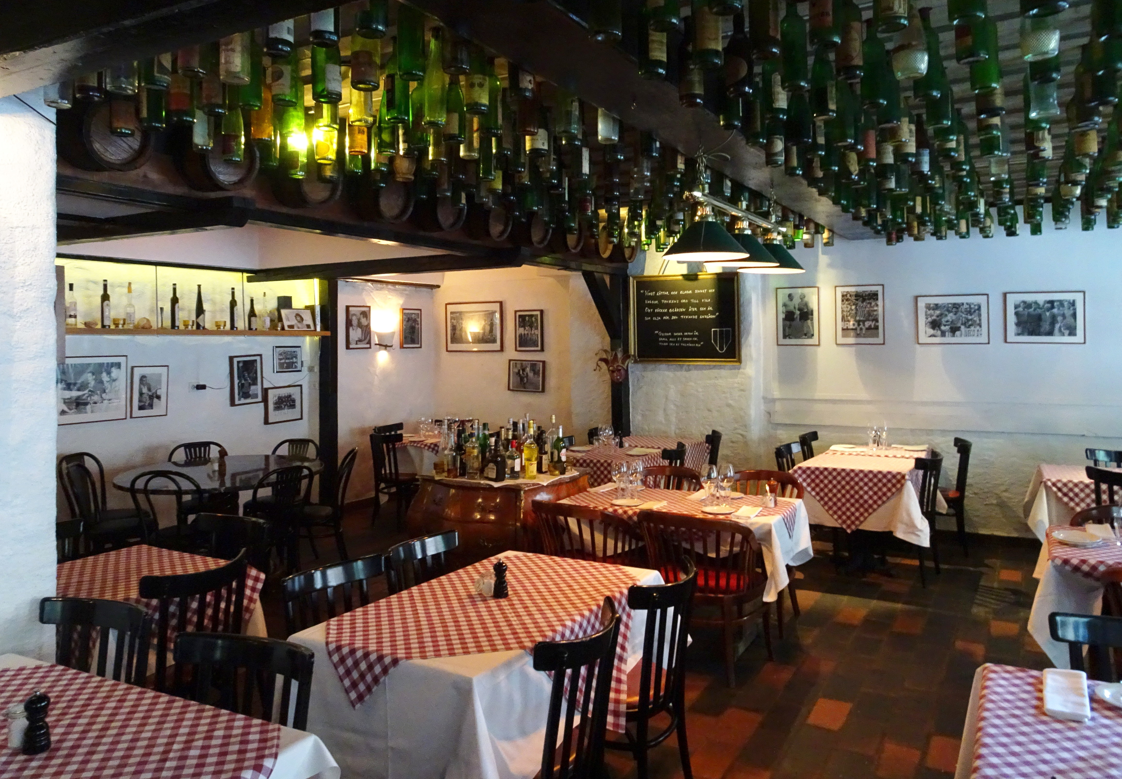 Före detta Östergök, nuvarande Lo Scudetto